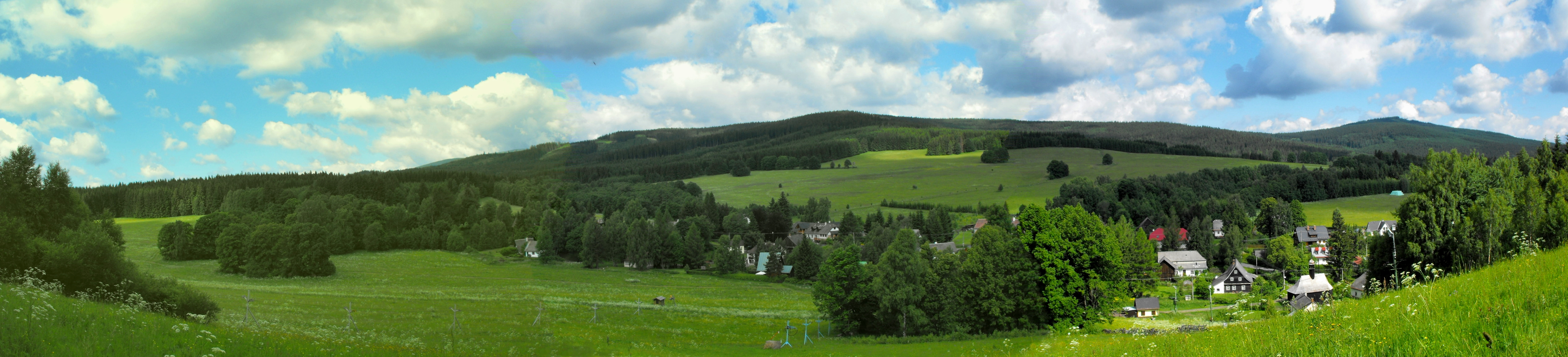 Panoramatický pohled - Suchá Rudná v roce 2009